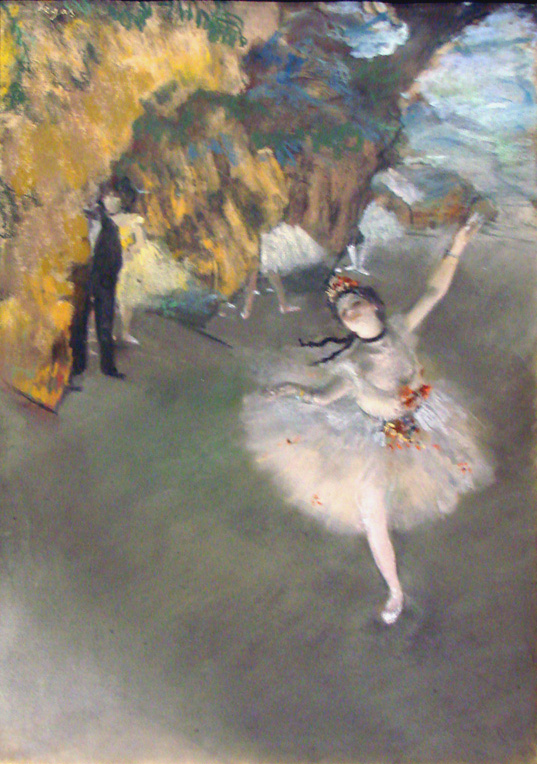 Edgar Degas, L’Étoile, ou la Danseuse sur Scène, (1878), pastel sur monotype, Musée d'Orsay Exposition "Le mystère et l'éclat", pastels du musée d'Orsay (October 8, 2008-February 1, 2009)